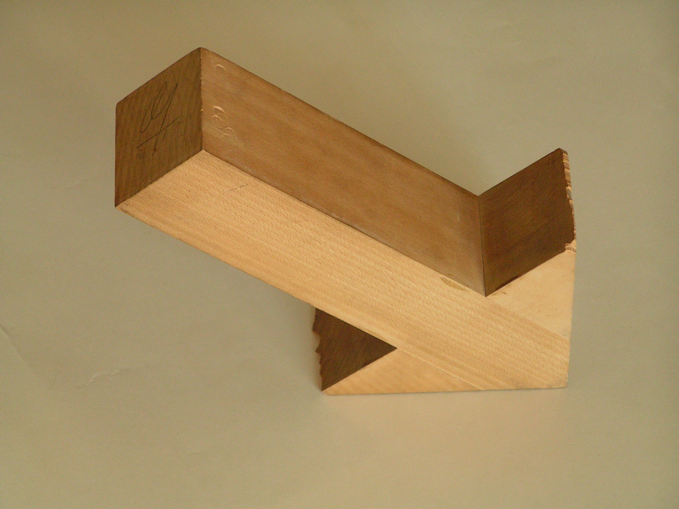 Artist :Gianfredo Camesi Title : détermination d'espace, 1969